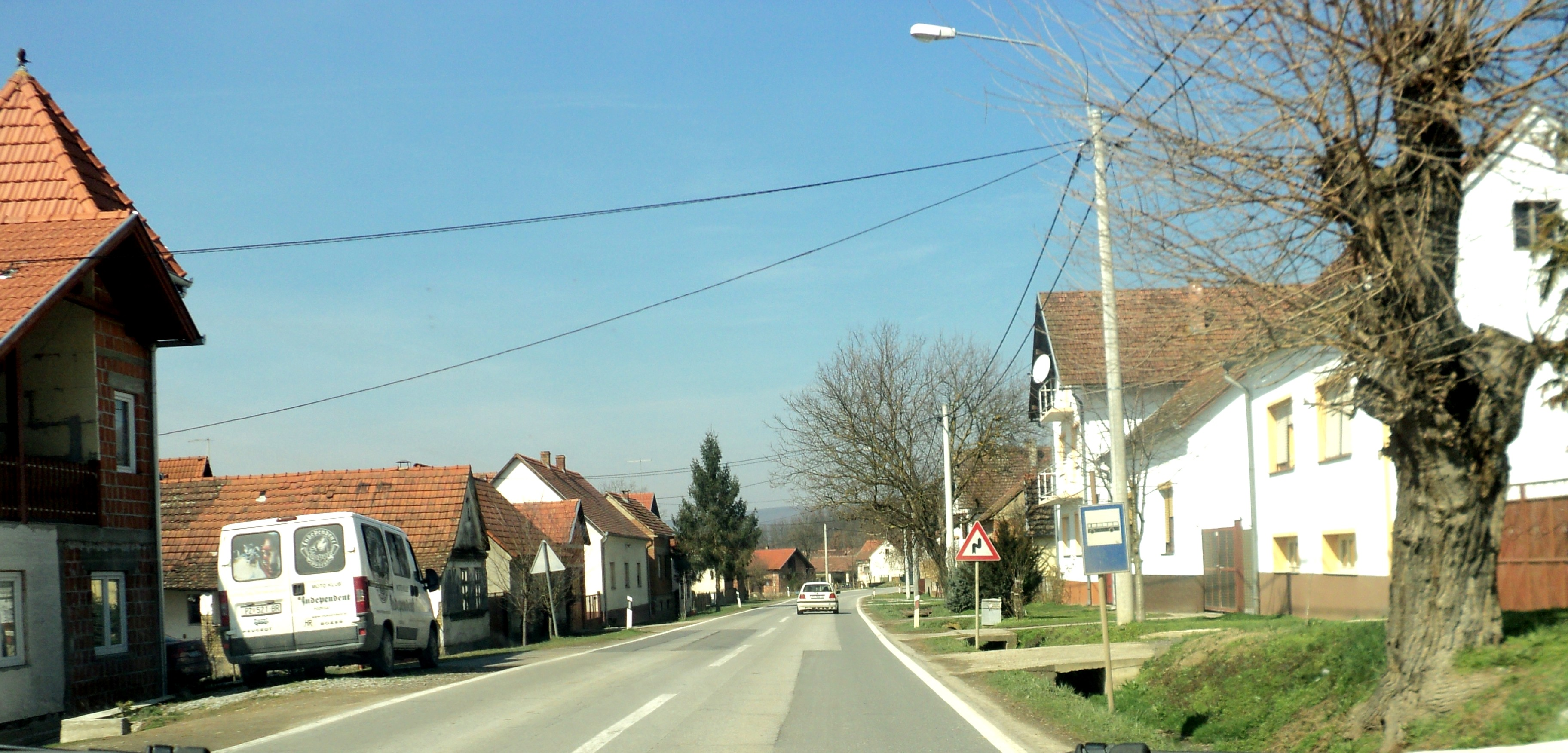 Frkljevci kod Pleternice